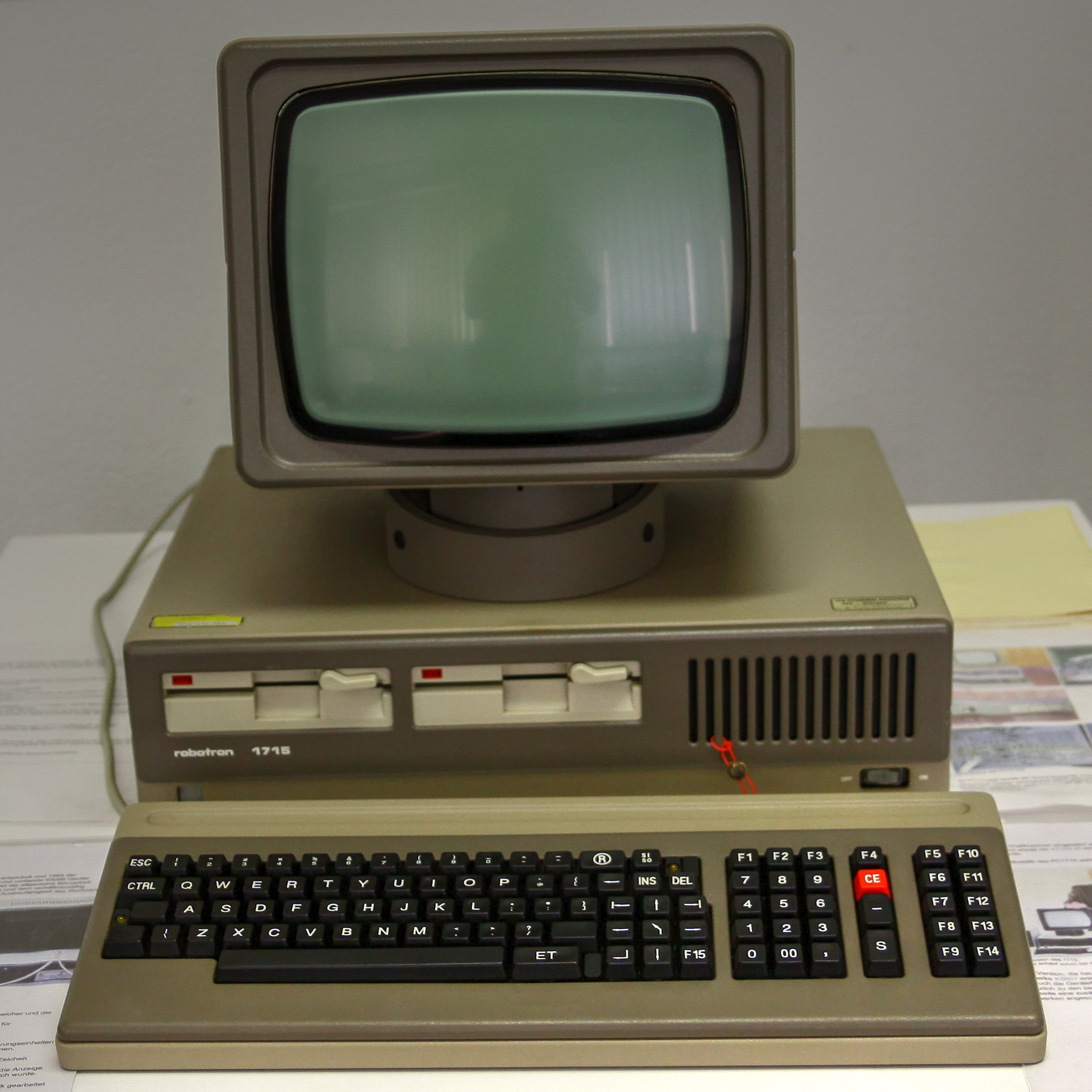 DDR-Museum Zeitreise in Radebeul 2012 - sog. Personal Computer robotron 1715